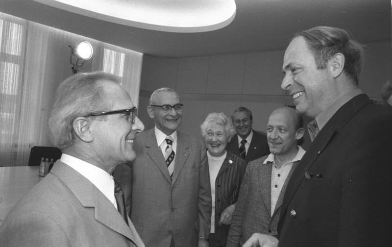 Berlin, Erich Honecker, Lars Werner ADN-ZB/Koard/1.7.74/Berlin: Der Erste Sekretär des ZK der SED, Erich Honecker (links) empfing am 1.7.74 die in der DDR weilende Delegation der Linkspartei-Kommunisten Schwedens (VPK) unter der Leitung des stellvertretenden Parteivorsitzenden Lars Werner (r.) zu einem Gespräch. Dabei waren das Mitglied des Politbüros und Sekretär des ZK der SED Paul Verner (2.v.l.), der Kandidat des Politbüros der ZK der SED Konrad Naumann (3.v.r.) sowie weitere Persönlichkeiten zugegen. Abgebildete Personen: Honecker, Erich: Staatsratsvorsitzender, Generalsekretär des ZK der SED, DDR (GND 118553399) Naumann, Konrad: 1. Sekretär Bezirksleitung Berlin der SED, Staatsratsmitglied, DDR (GND 121094510) Verner, Paul: Mitglied des Staatsrates, Sekretär des Zentralkomitees der SED, DDR (GND 118626639) Werner, Lars: Vorsitzender der KP, Schweden